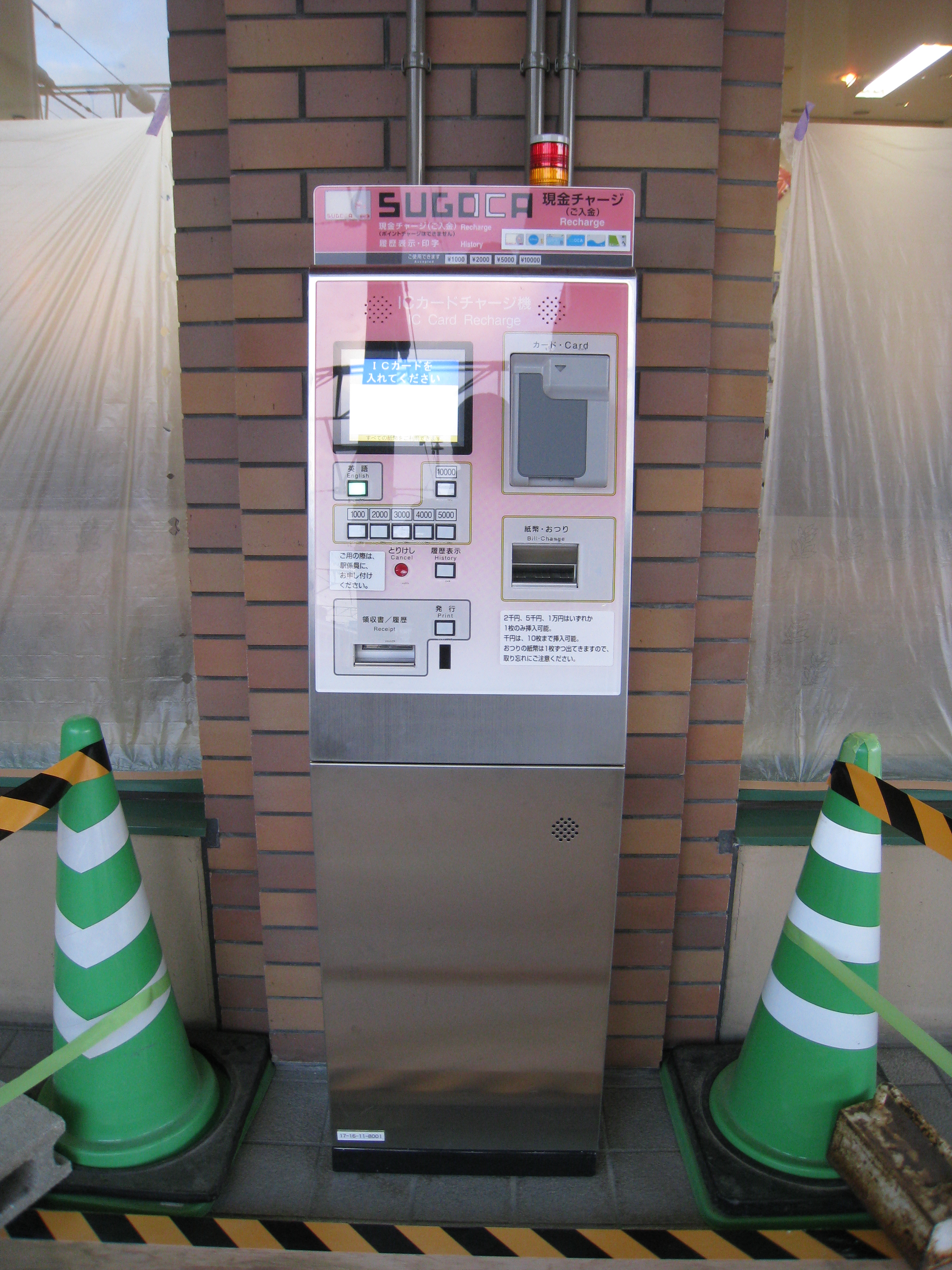 長崎駅撮影